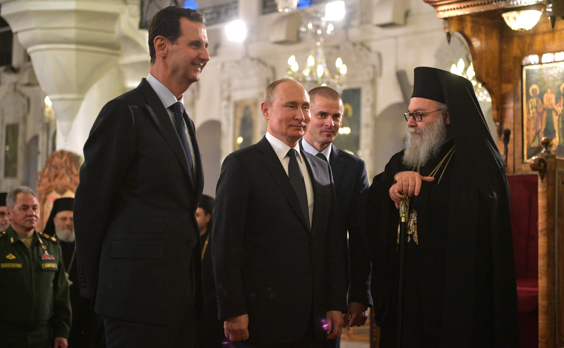 В православной церкви Святой Девы Марии. С патриархом Антиохийским и всего Востока Иоанном X. Слева – Президент Сирии Башар Асад.